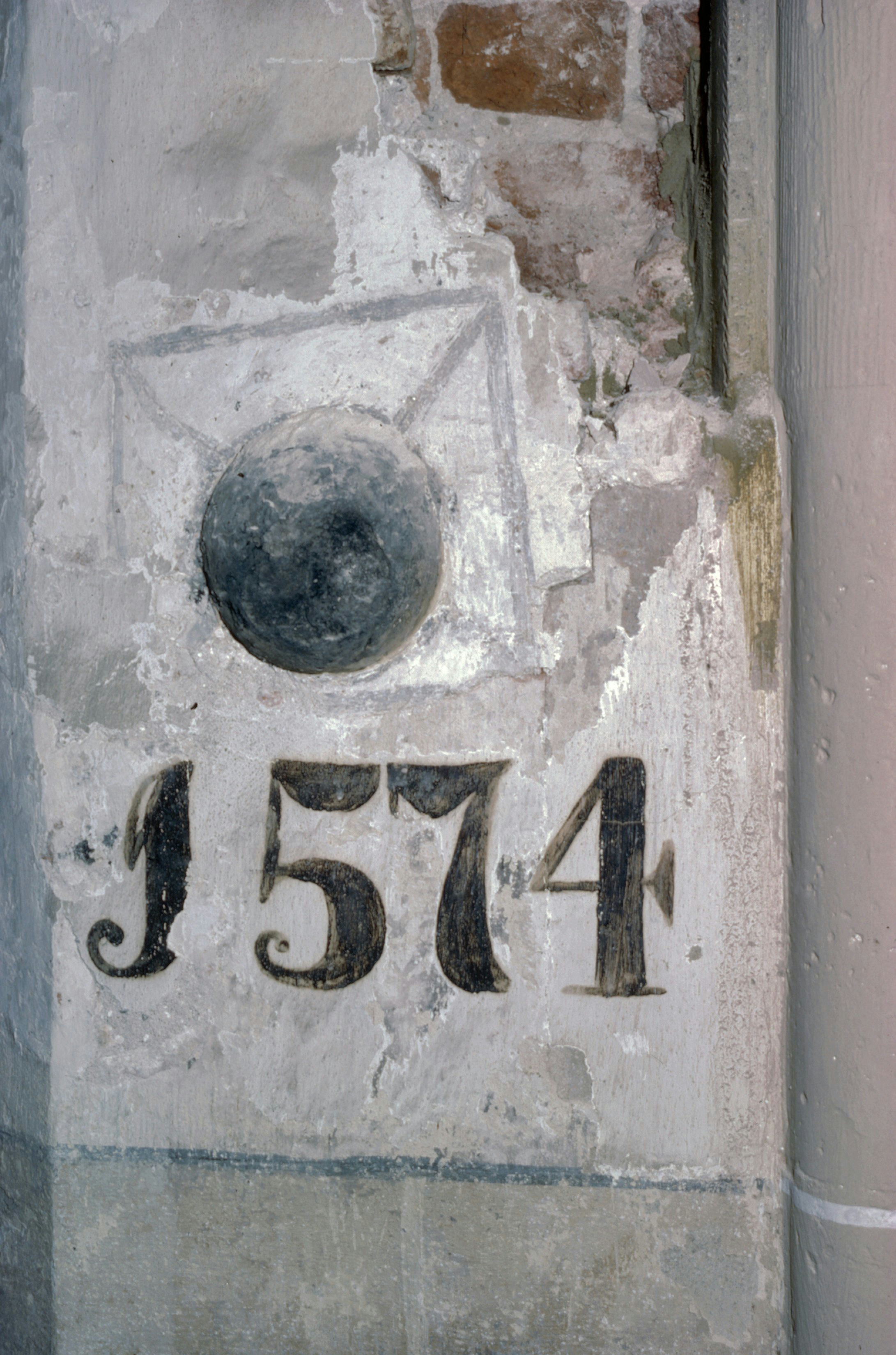 Grote of Sint-Maartenskerk: Interieur, zuidelijk pijlers, kogel in pijler 5, (opmerking: Tijdens restauratie 1977 - 1985, pijler 5(zie documentatie expl.nr. 105.735))